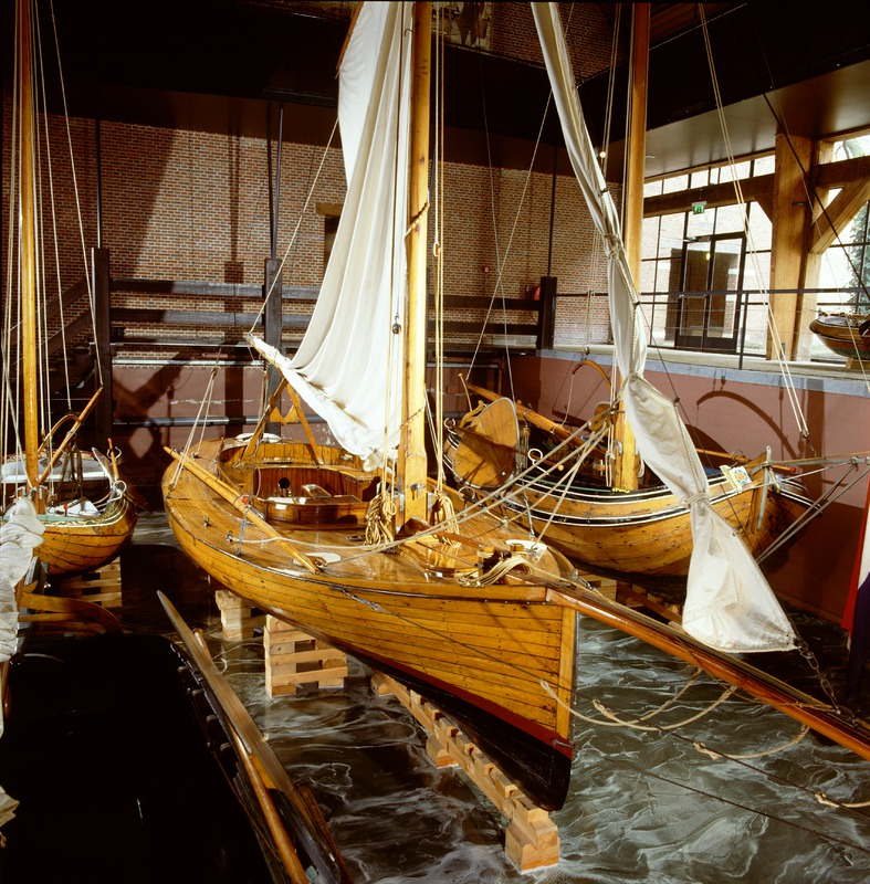 Midzwaardjacht